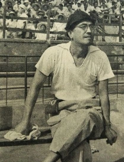 御園生崇男